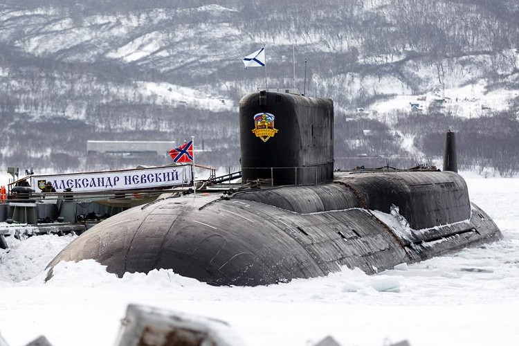 Атомный подводный крейсер стратегического назначения "Александр Невский"